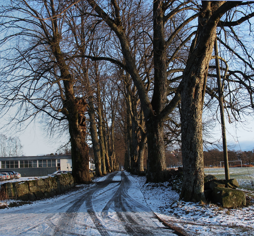 Tangen allé på Hisøy i Arendal